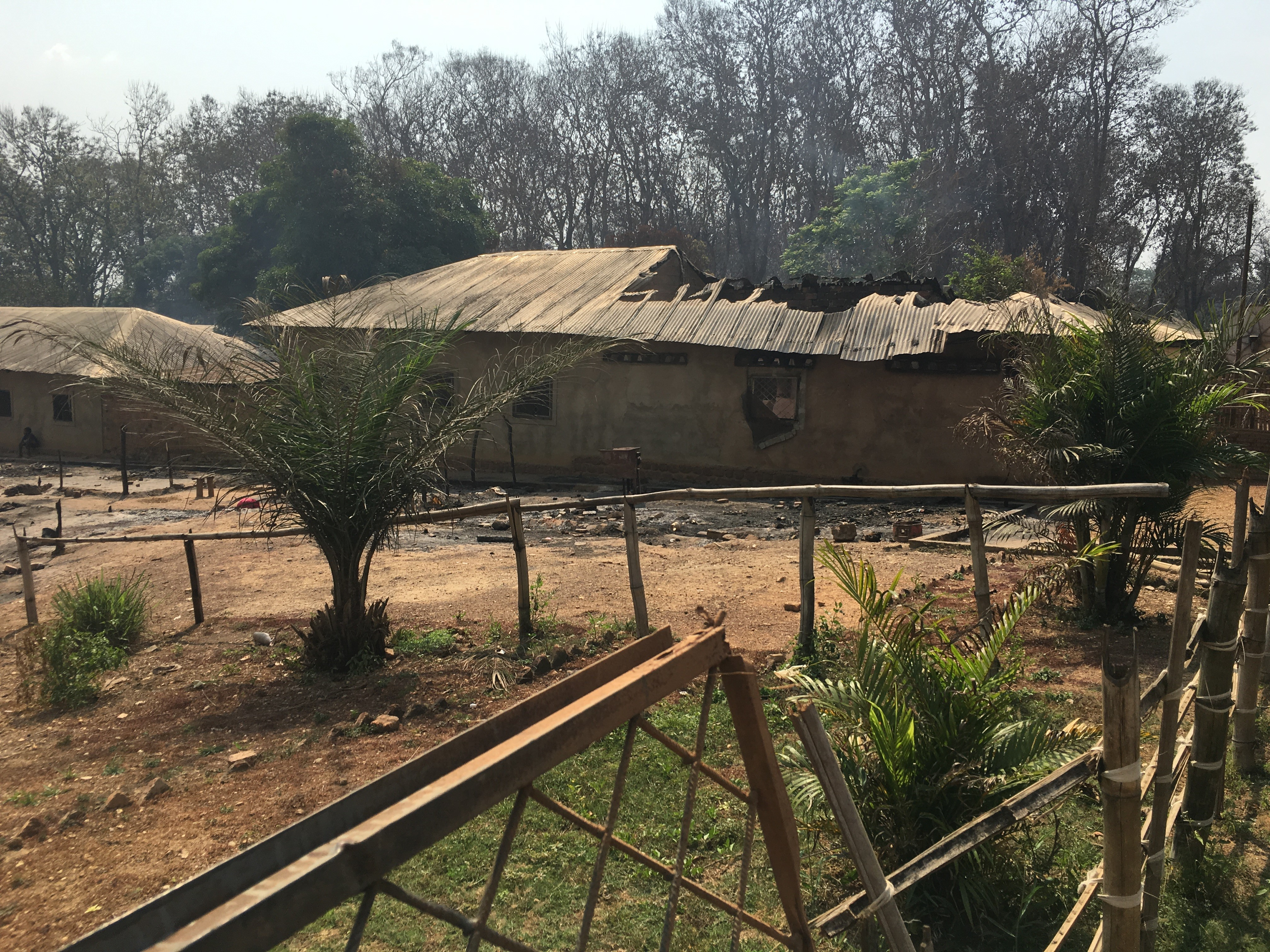 Une maison brûlée lors des attaques à Alindao, Centrafrique, le 29 novembre 2018. (VOA/ Felix Yepassis-Zembrou)